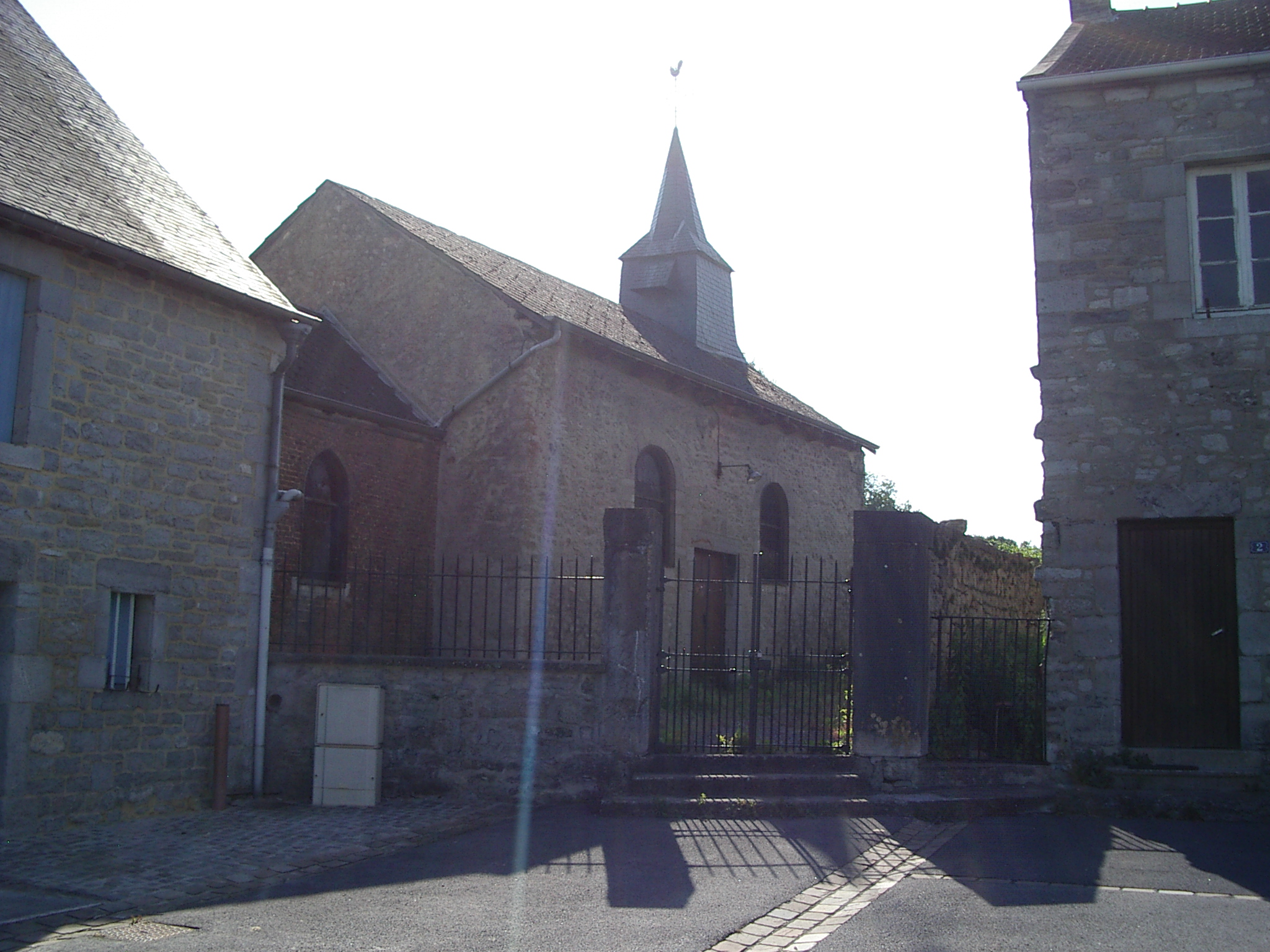 Chapelle église de Rancennes , commune française, située dans le département des Ardennes de la région Champagne-Ardenne